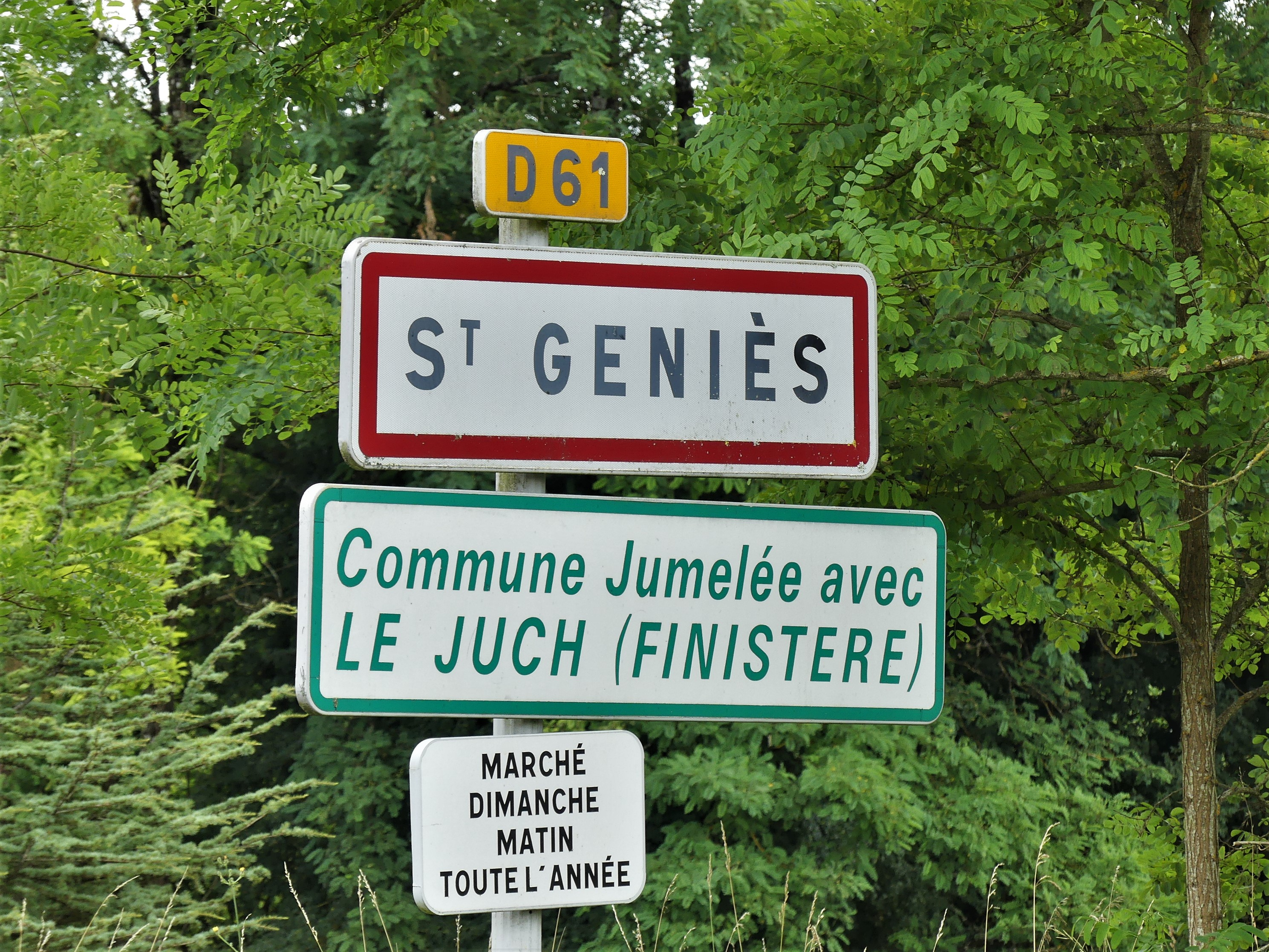 Panneau de jumelage de Saint-Geniès, Dordogne, France.